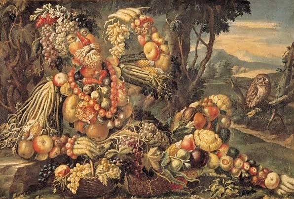 aus einer Serie der Vier Jahreszeiten.